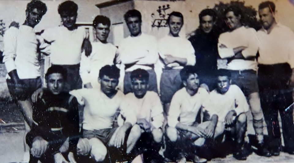 Foto risalente alla prima squadra del San Pietro Apostolo primi anni '60